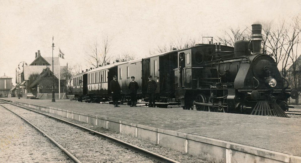 Ryomgard Gjerrildbanen 1911